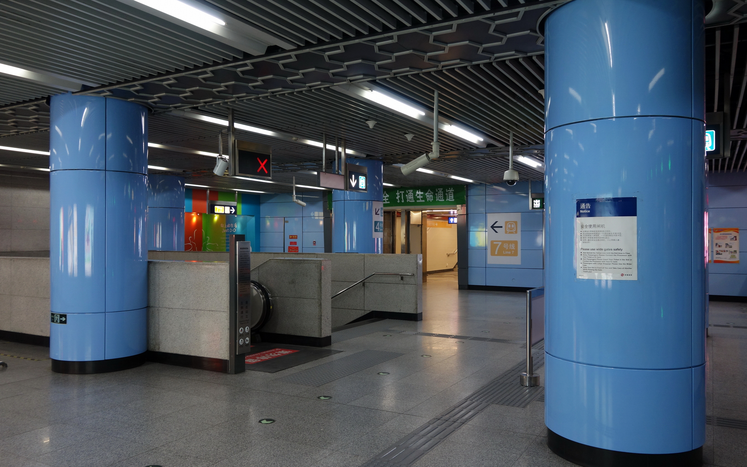 北京地铁菜市口站4号线站厅